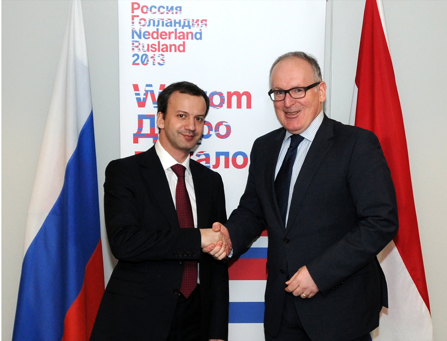 130306 Dvorkovic vice MP Rusland bij Timmermans 1174